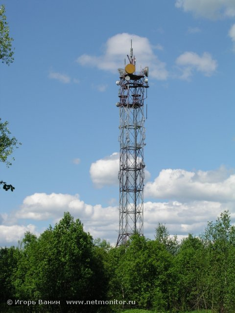 Ретранслятор в городе Волхов